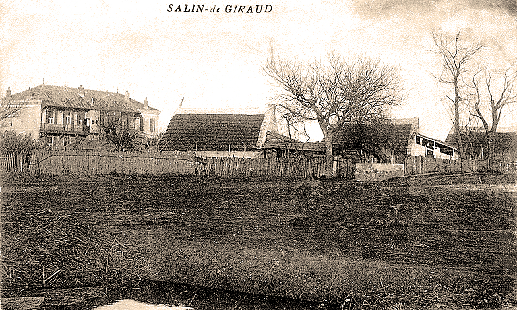 Deux cabanes d'ouvriers sauniers, au début du XXe siècle, à Salin-de-Giraud, dans les Bouches-du-Rhône